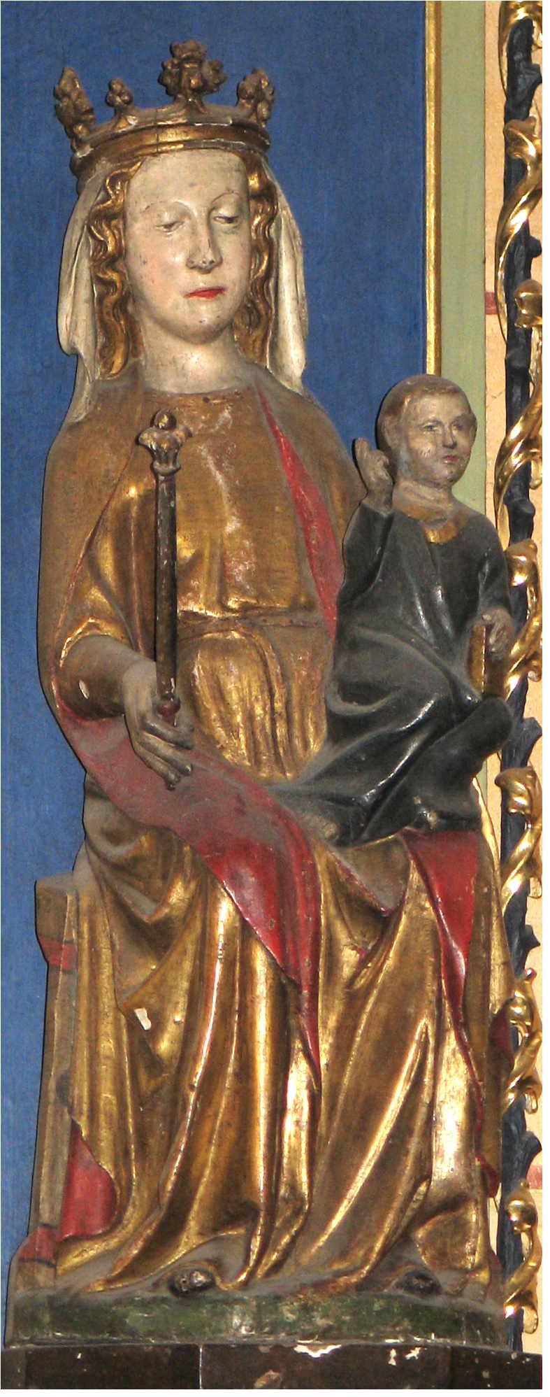 Madonna ëm 1320 an der St. Gangolkierch zu Tréier.